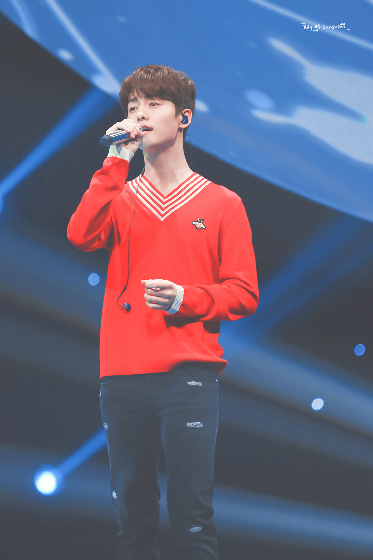 171231 东方卫视 梦圆东方 跨年